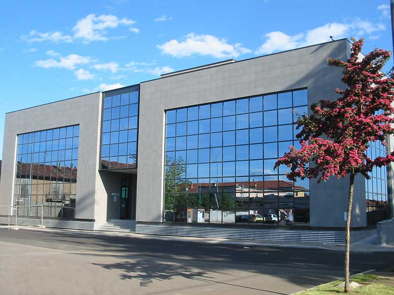 Villa Cortese (Mi) Il Municipio ( foto Peppino Barlocco- )